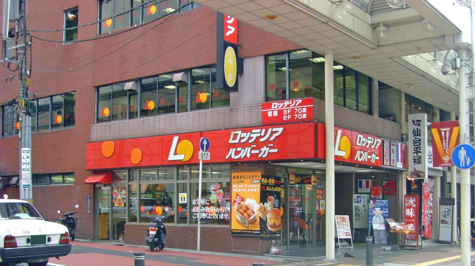 ロッテリア仙台一番町店